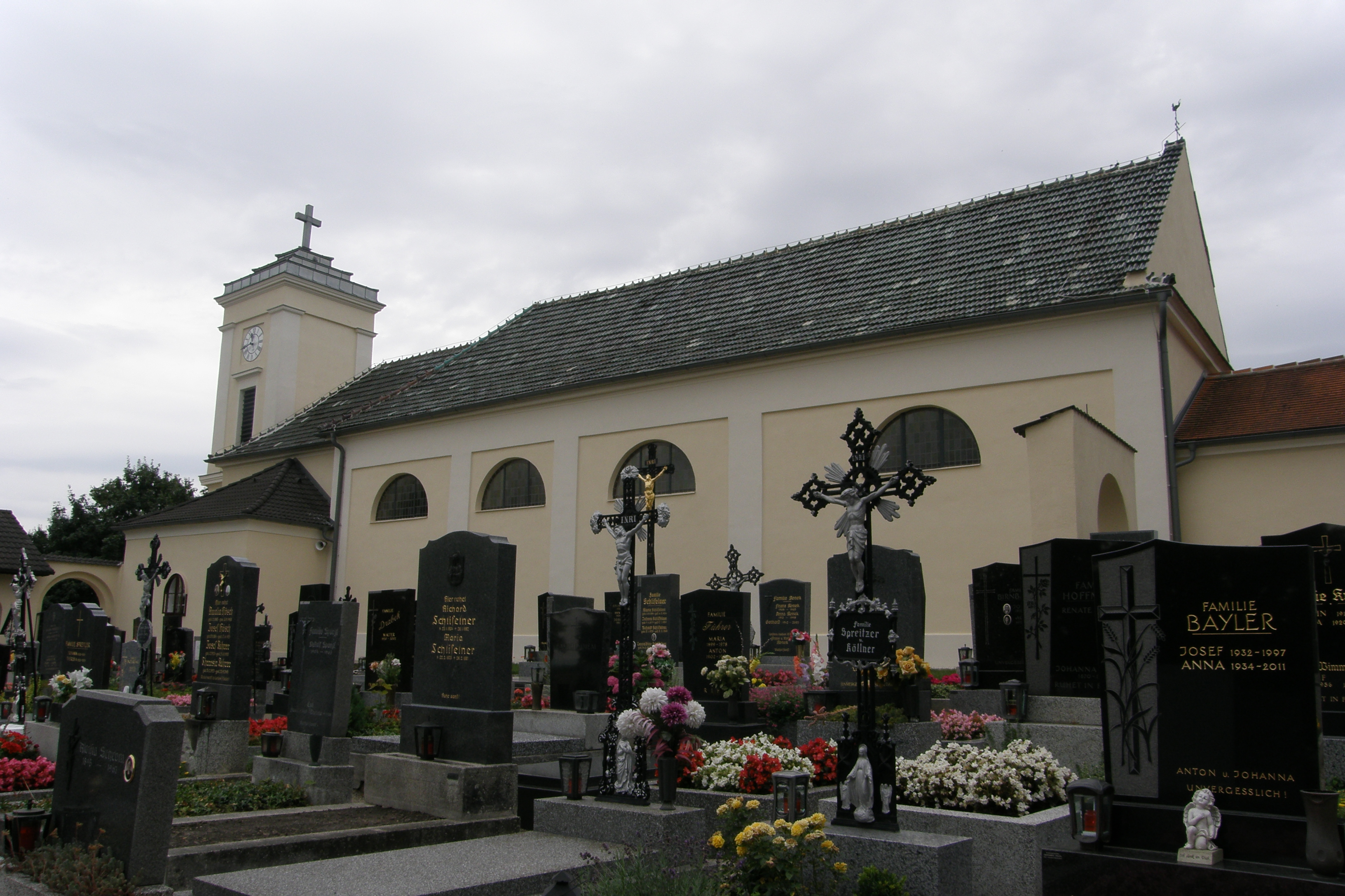 Kath. Pfarrkirche Allerheiligste Dreifaltigkeit und Friedhof